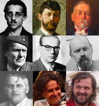 Famous Yugoslavs